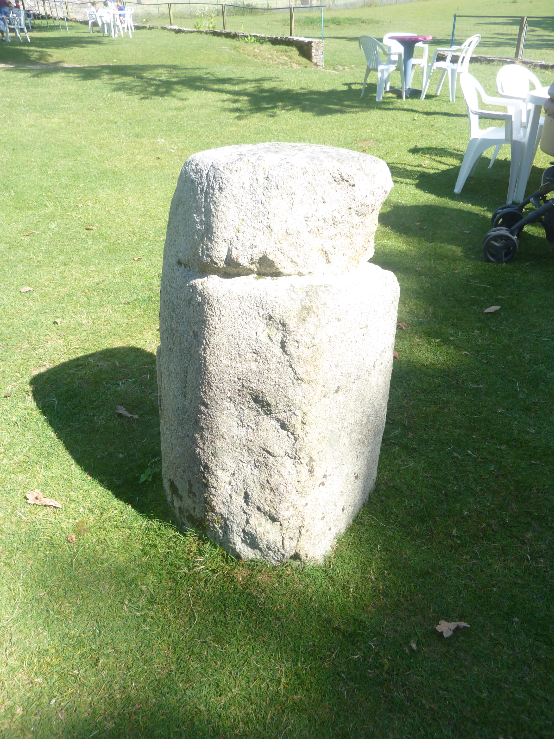 Stèle protohistorique de l'âge du fer, époque de La Tène (parc animalier du Quinquis en Clohars-Carnoët)